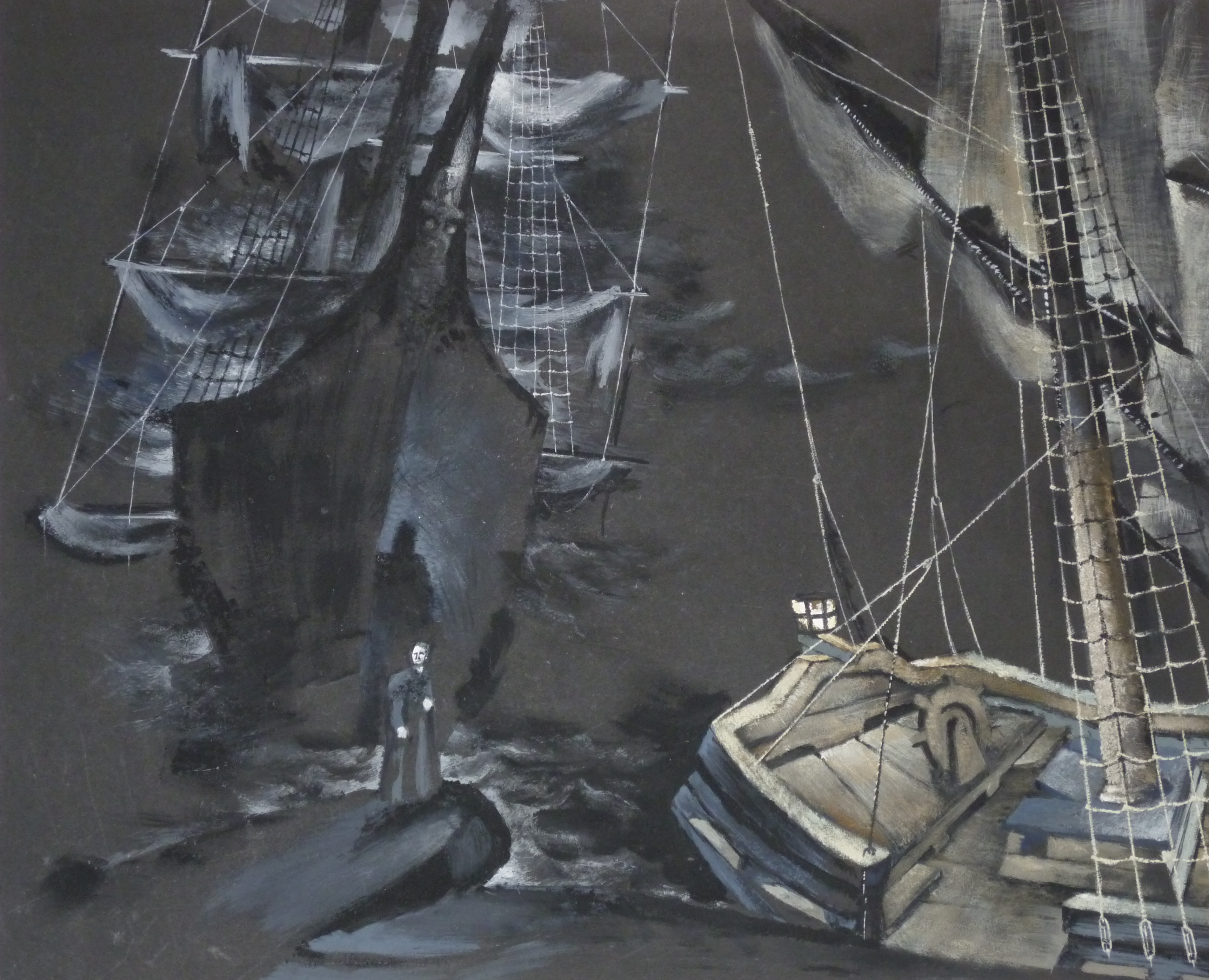 Bühnenbildentwurf von Helmut Jürgens für Der Fliegende Holländer von Richard Wagner, Aufführung München 1950